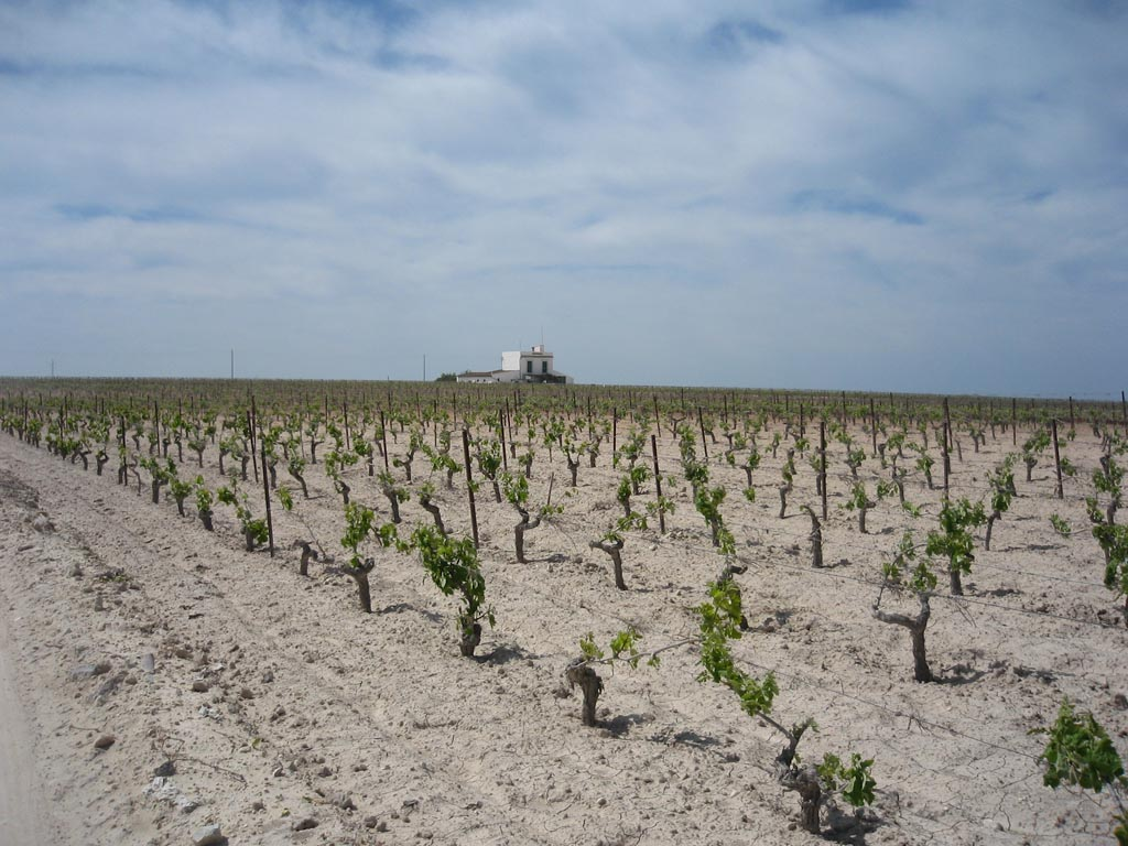 Vista parcial del pago de Miraflores la Alta, en Sanlúcar de Barrameda, donde puede apreciarse la albariza, uno de los suelos característicos del Marco de Jerez y la casa de labor de la Viña San Rafael.